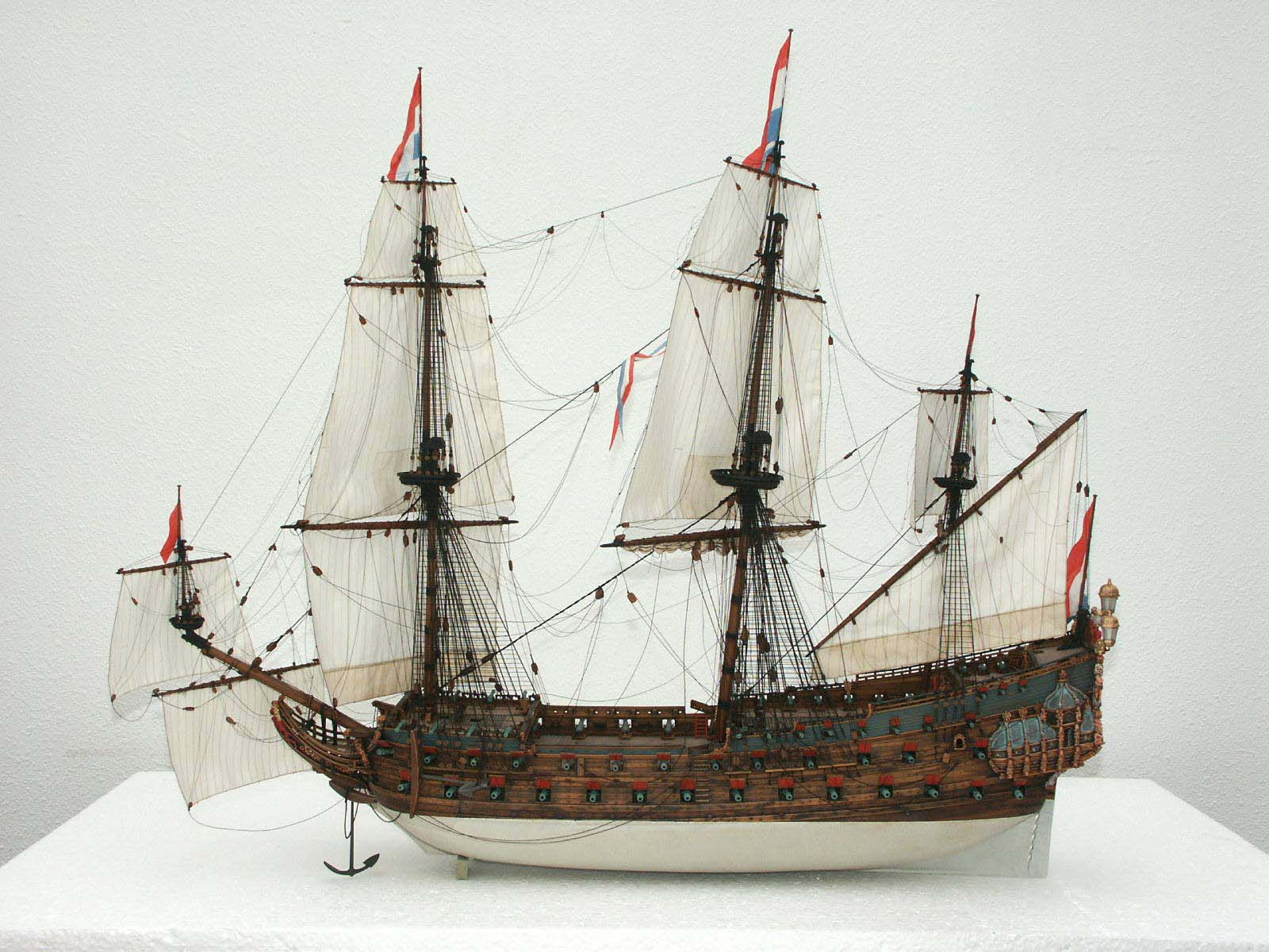 Model van De Zeven Provincien uit 1665. Foto: Ad van der Zee